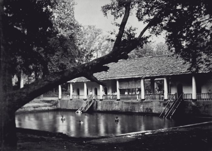 Foto. Badplaats Banjoe Biroe (Blauw Water), Pasoeroean